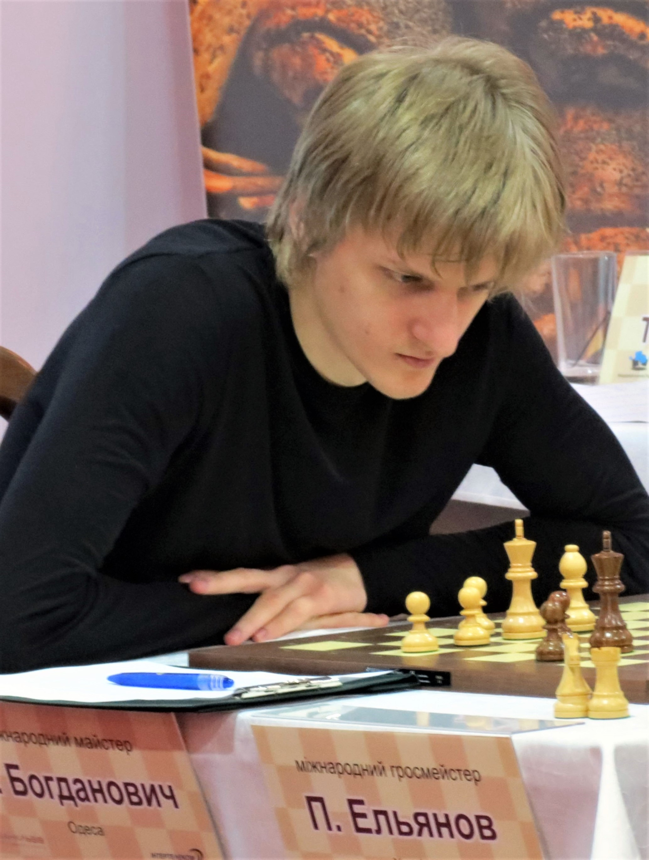 Станислав Эдуардович Богданович